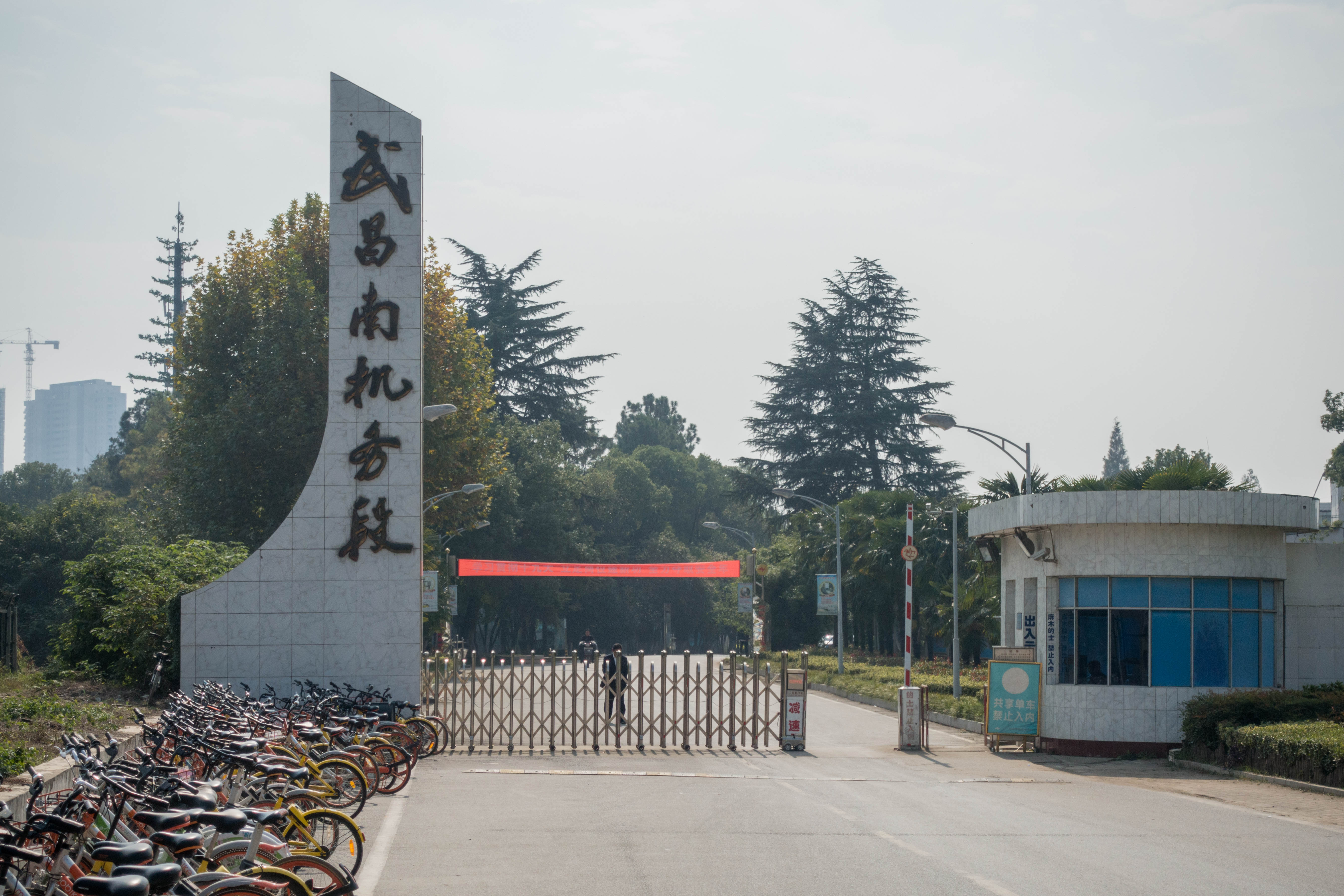 武汉铁路局武昌南机务段大门